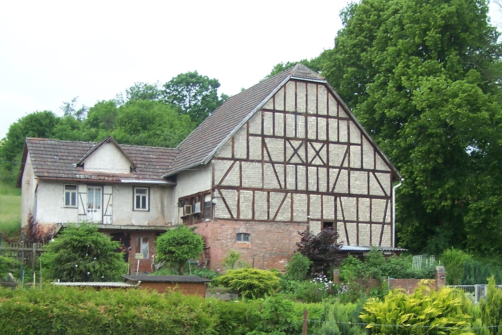 Fachwerkhaus in der Ortslage Urnshausen.